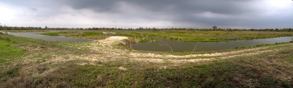 La Francesa Panorama zona umida This is a photo of a monument which is part of cultural heritage of Italy.